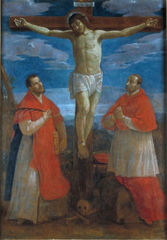 Crocifissione tra i Santi Valentino e Carlo Borromeo, pala del pittore Ercole Sarti detto il Muto di Ficarolo, dipinta nella prima metà del XVII secolo, conservata nella Chiesa parrocchiale di San Valentino a Salara.